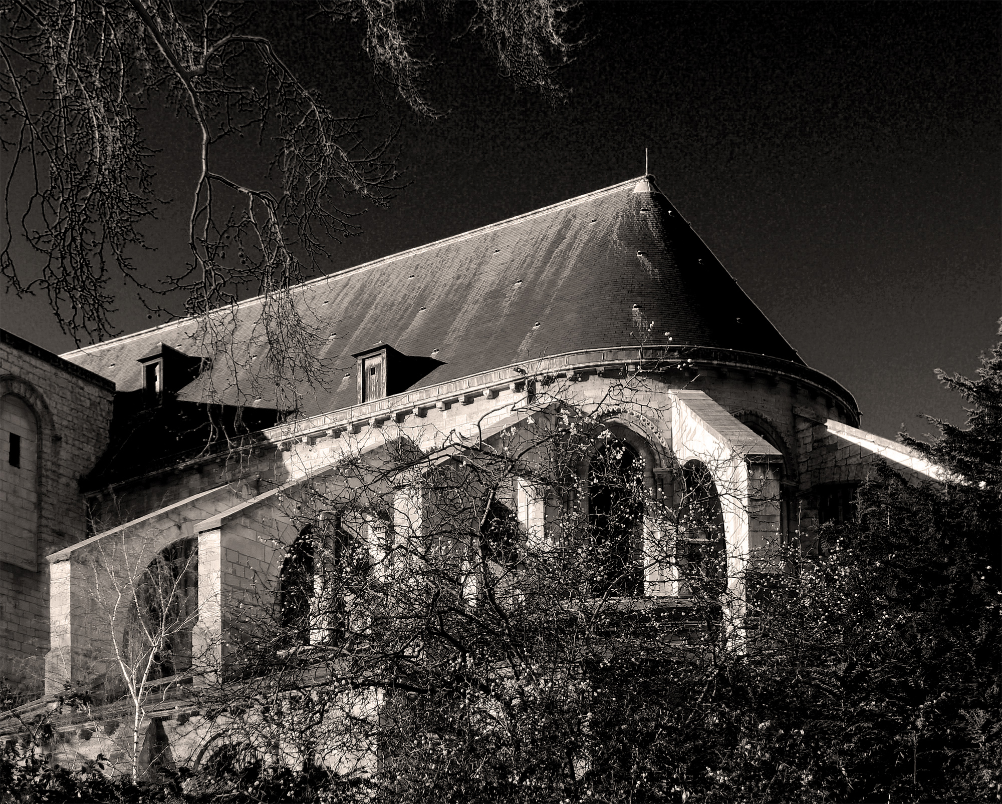 Eglise Saint-Germain-des-Prés (arc-boutants sud) - Paris VI This building is en partie classé, en partie inscrit au titre des Monuments Historiques. It is indexed in the Base Mérimée, a database of architectural heritage maintained by the French Ministry of Culture, under the references PA00088489 and PA00088509 .